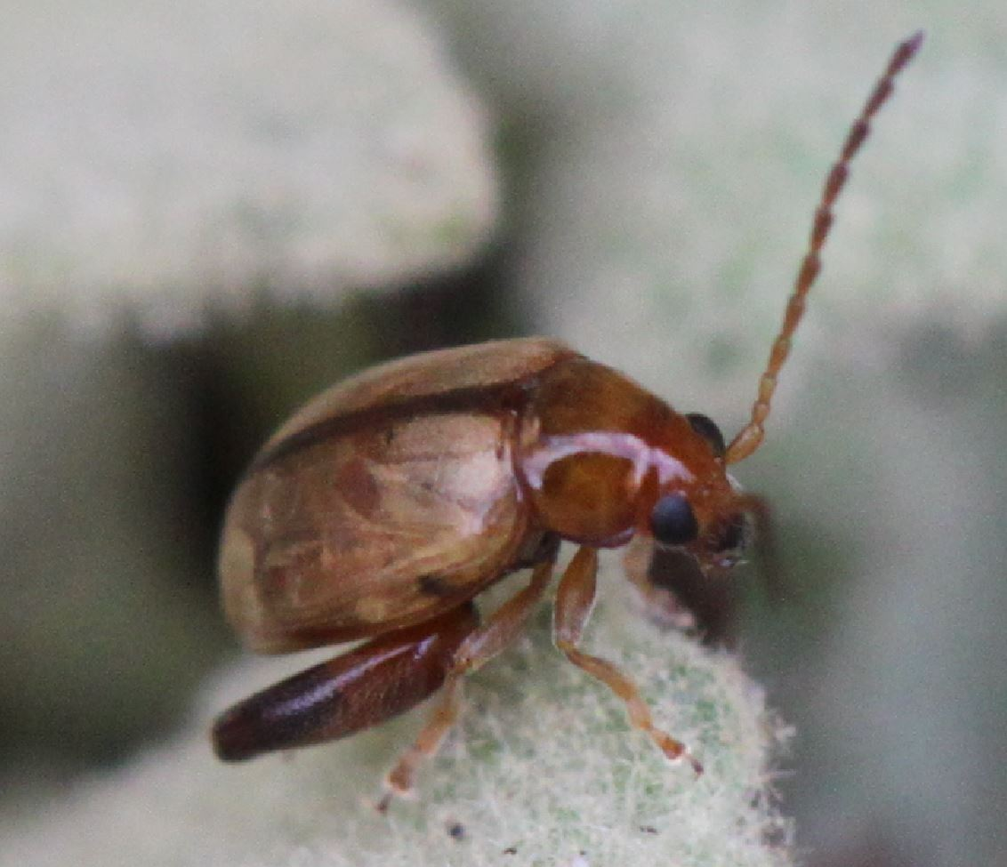 Longitarsus sp.(~3mm) am 19.9.2016 in der Schwetzinger Hardt